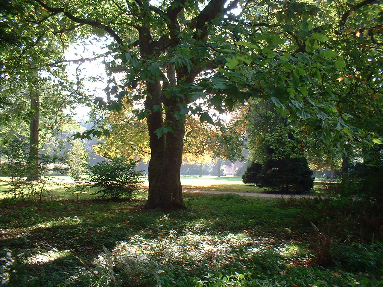 Herbst im Rencks-Park NMS-SH